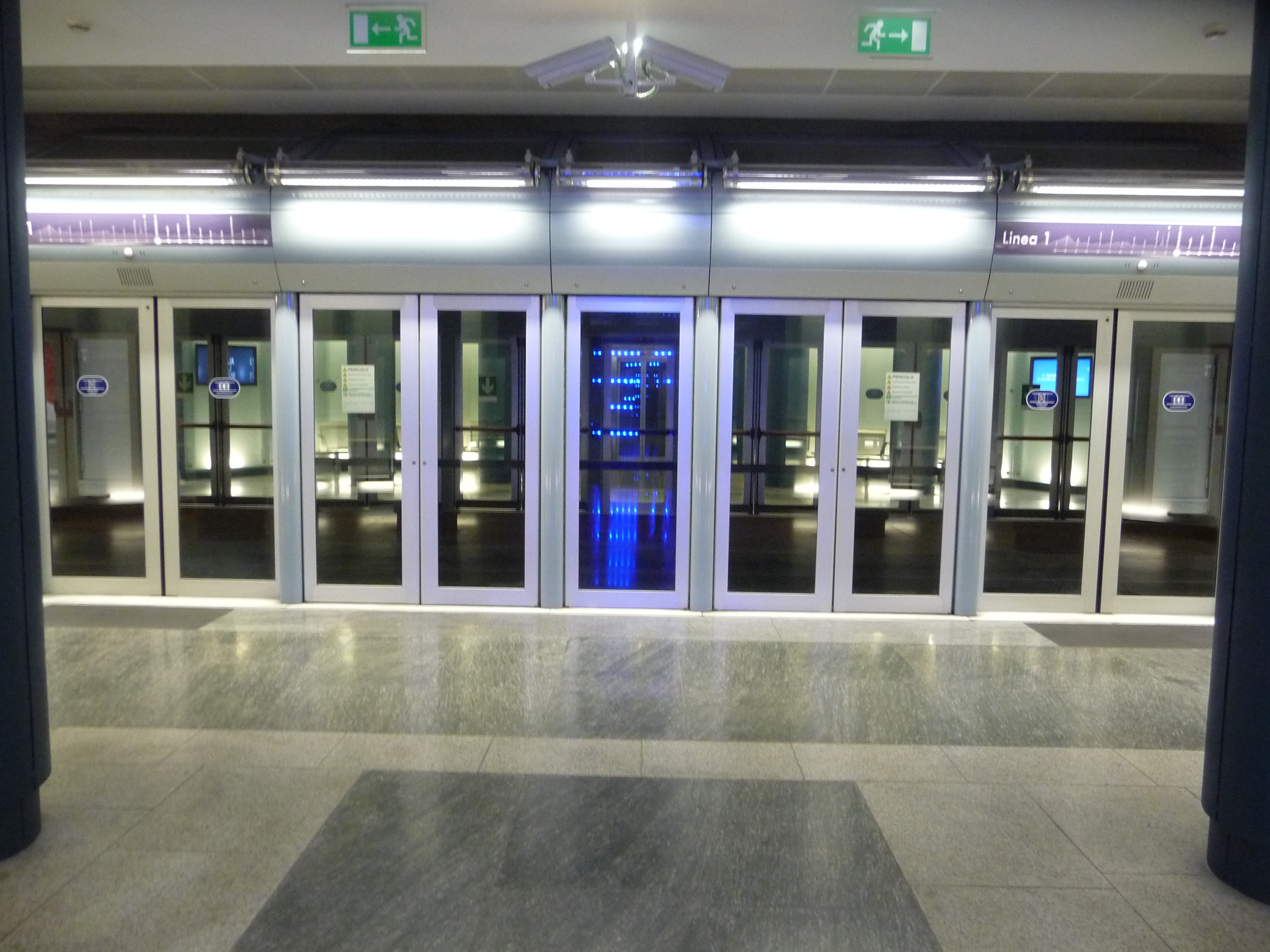 Metropolitana di Torino, stazione Porta Susa